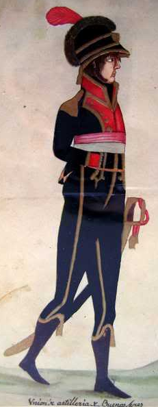 Uniforme de oficial del Regimiento de Artillería de la Unión